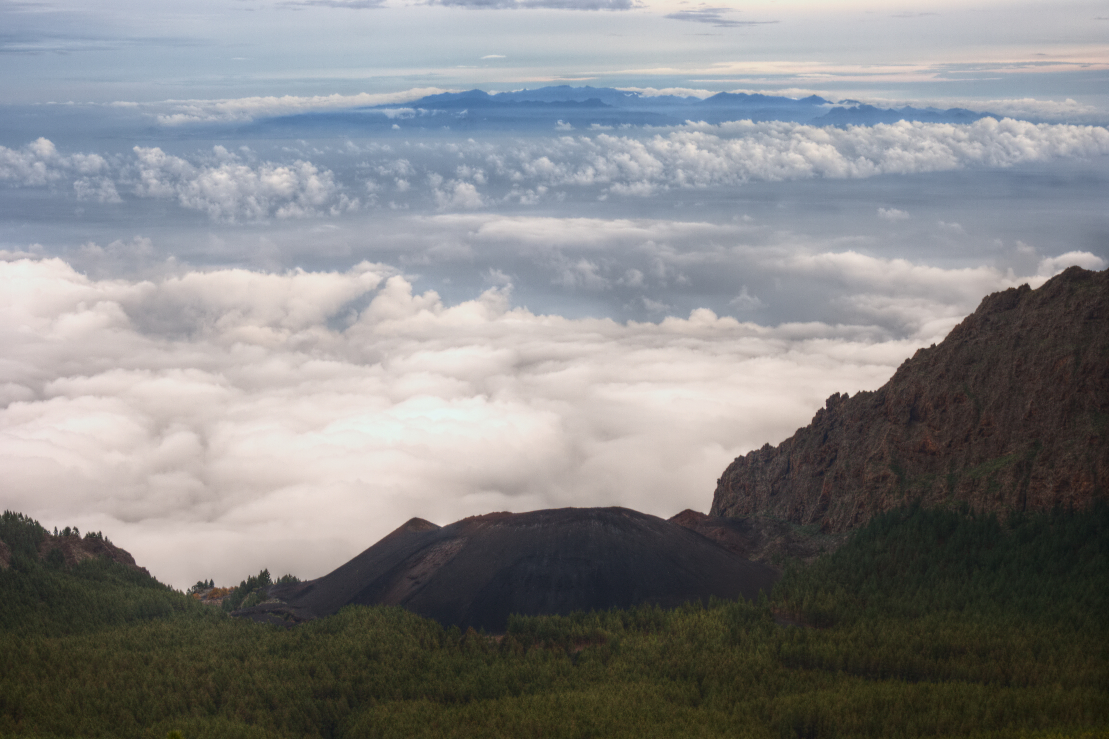 Volcán de Arafo con Gran Canaria al fondo.